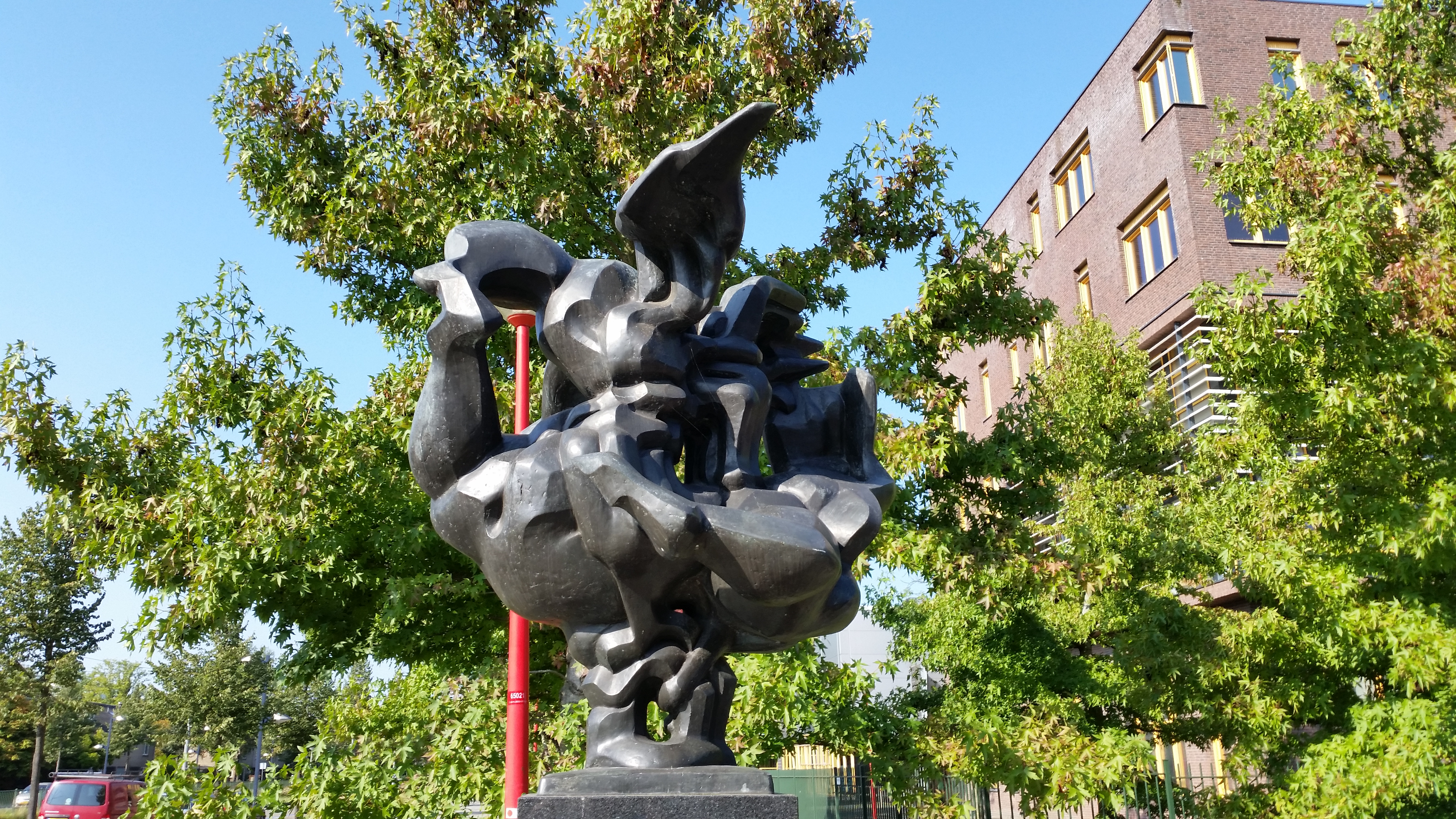 Vliegende vogels van Limperg